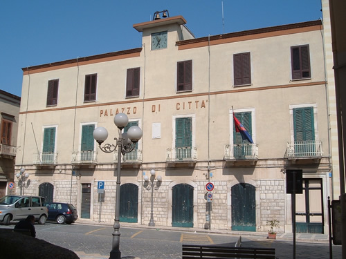 Palazzo di Città (2007)